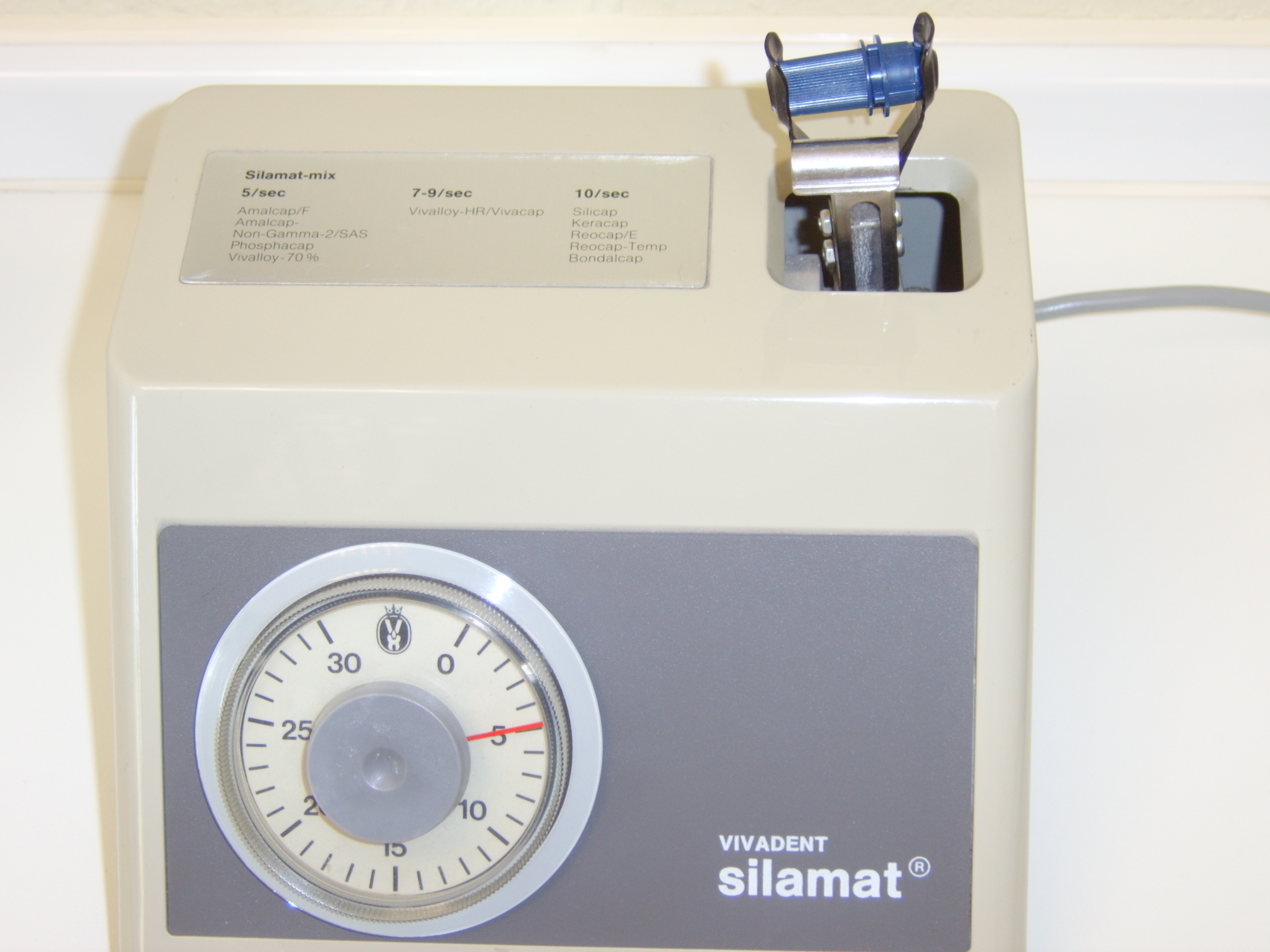 Amalgamrüttler für Amalgamfüllungen